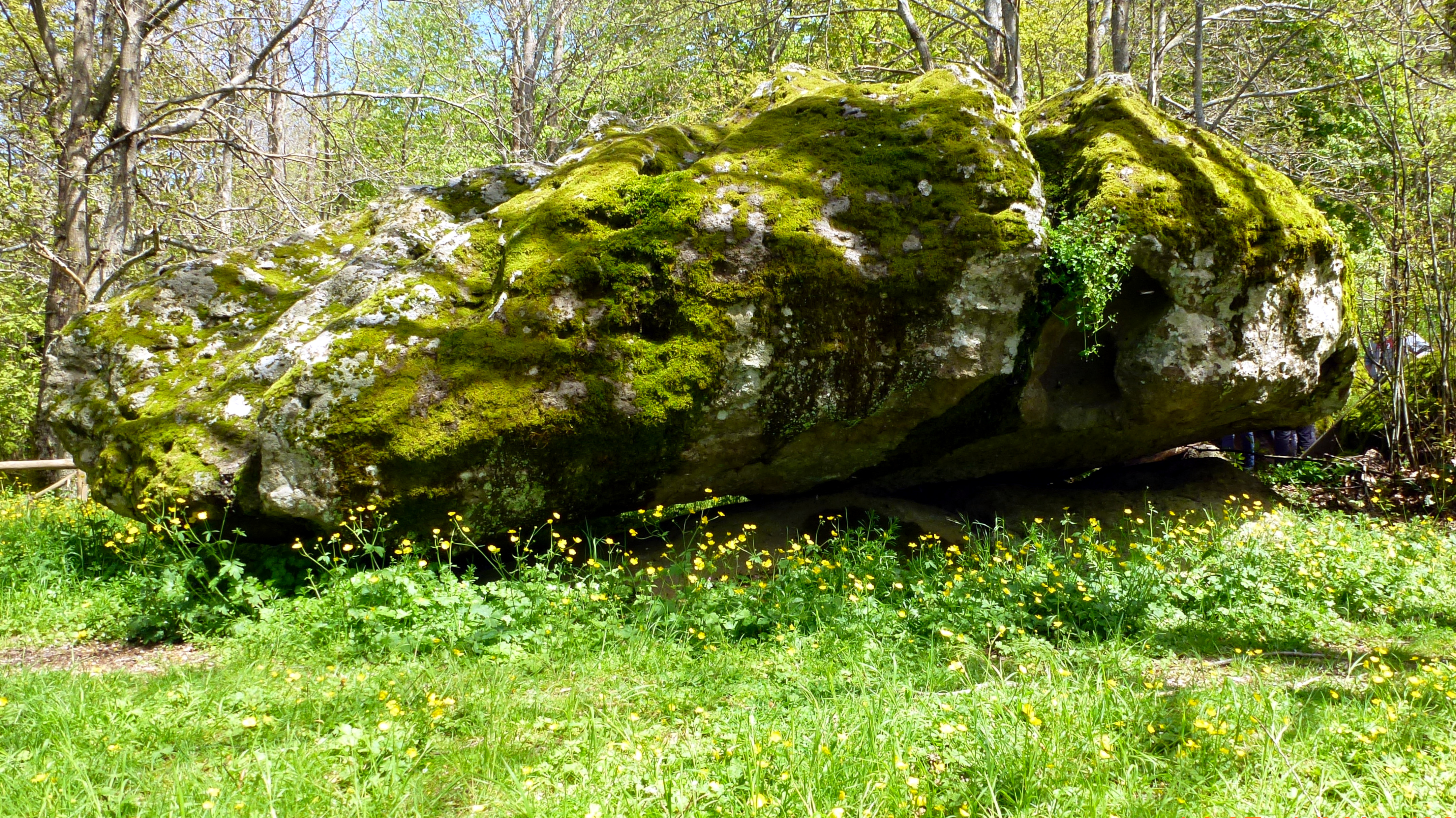 Il masso è citato da Plinio il Vecchio nel suo trattato Naturalis historia.